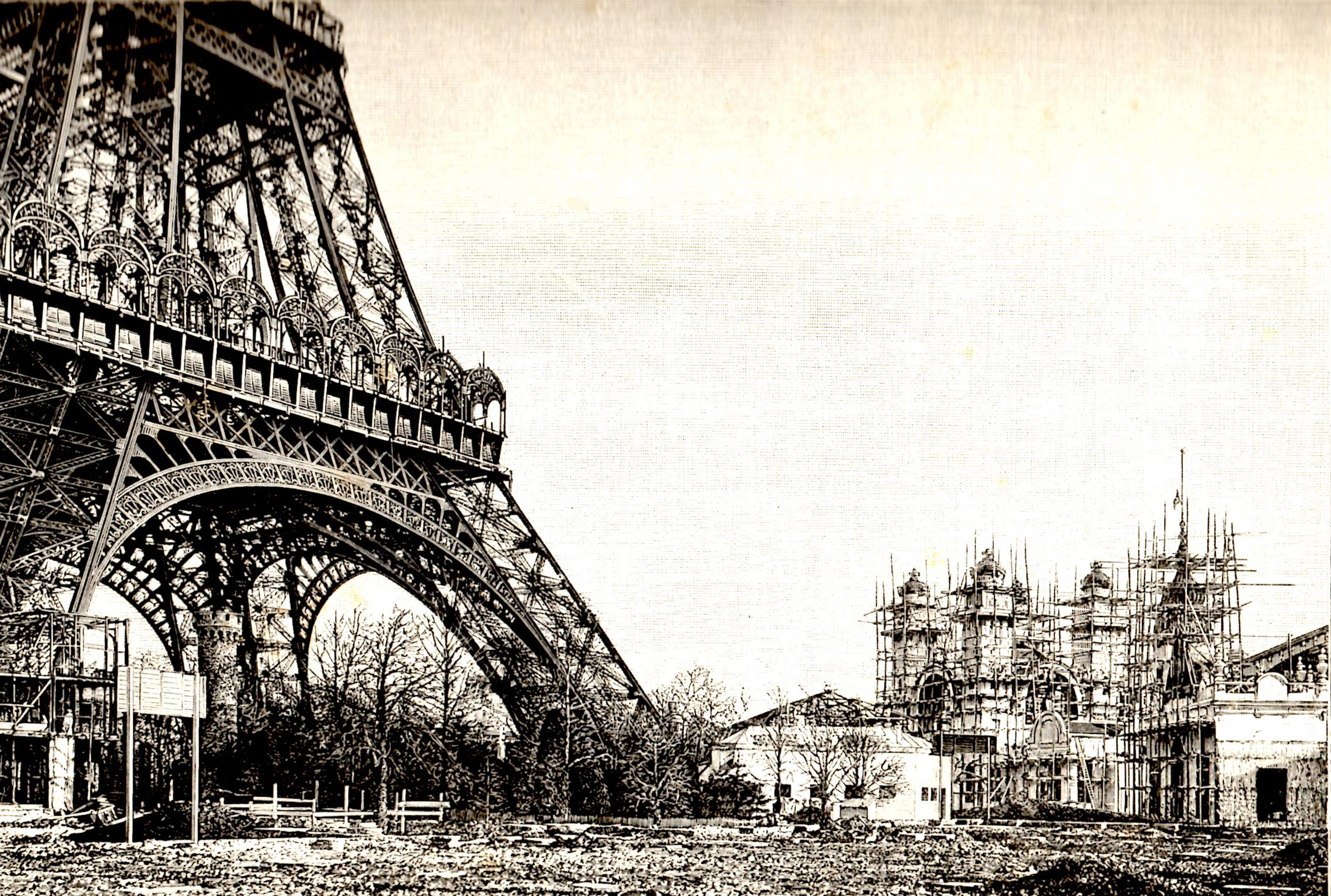 La Tour Eiffel avec cheminée, pilier sud et Palais Bolivien en construction pour l'exposition universelle de Paris de 1889, Champ-de-Mars, Paris.